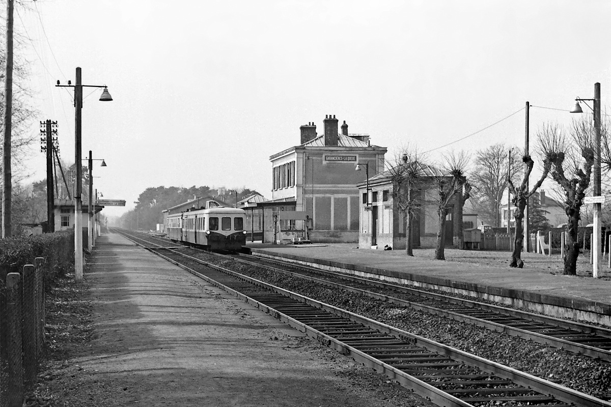 La gare de Garancières - la Queue dans les années vers 1977 (Ligne Saint-Cyr - Surdon)